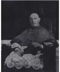 Cardenal Antonio Caggiano.